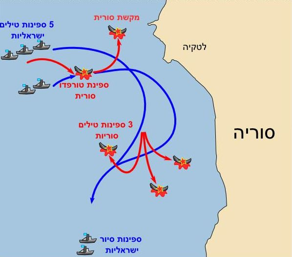 קרב לטקיה